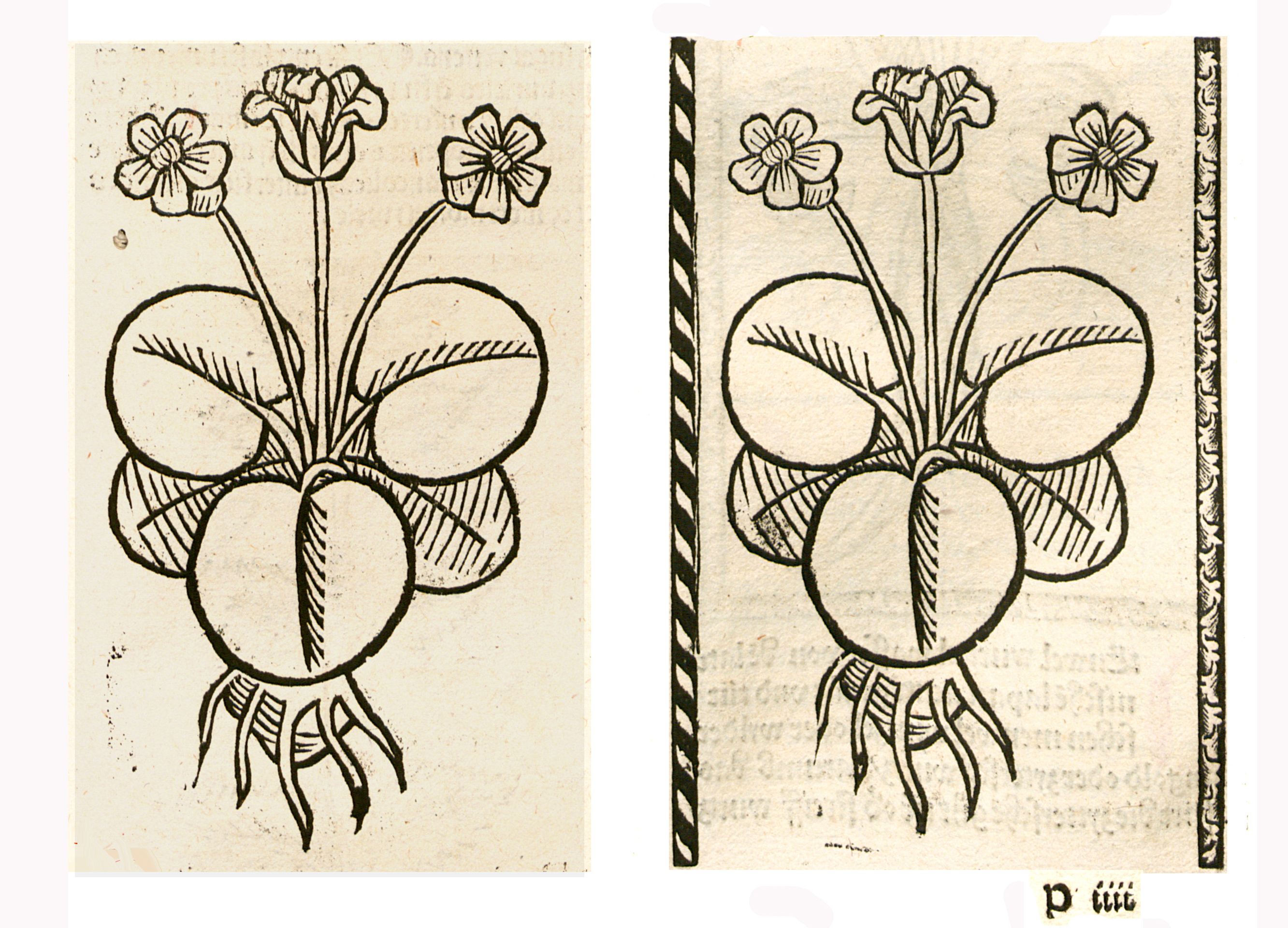 Abbildung von: Moß Blumen (Caltha palustris)